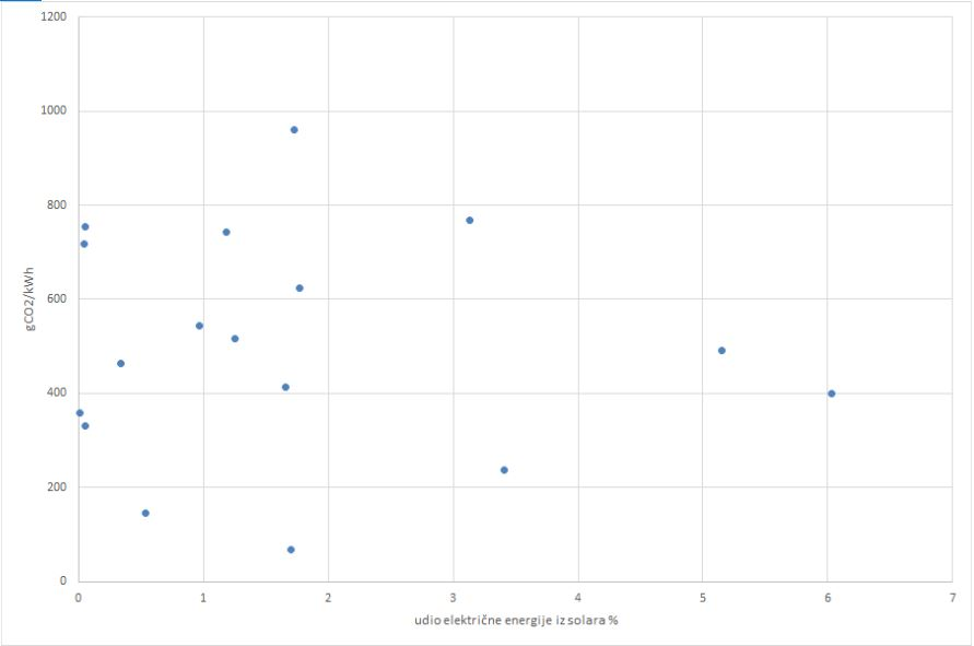 Udjeligraf1c23